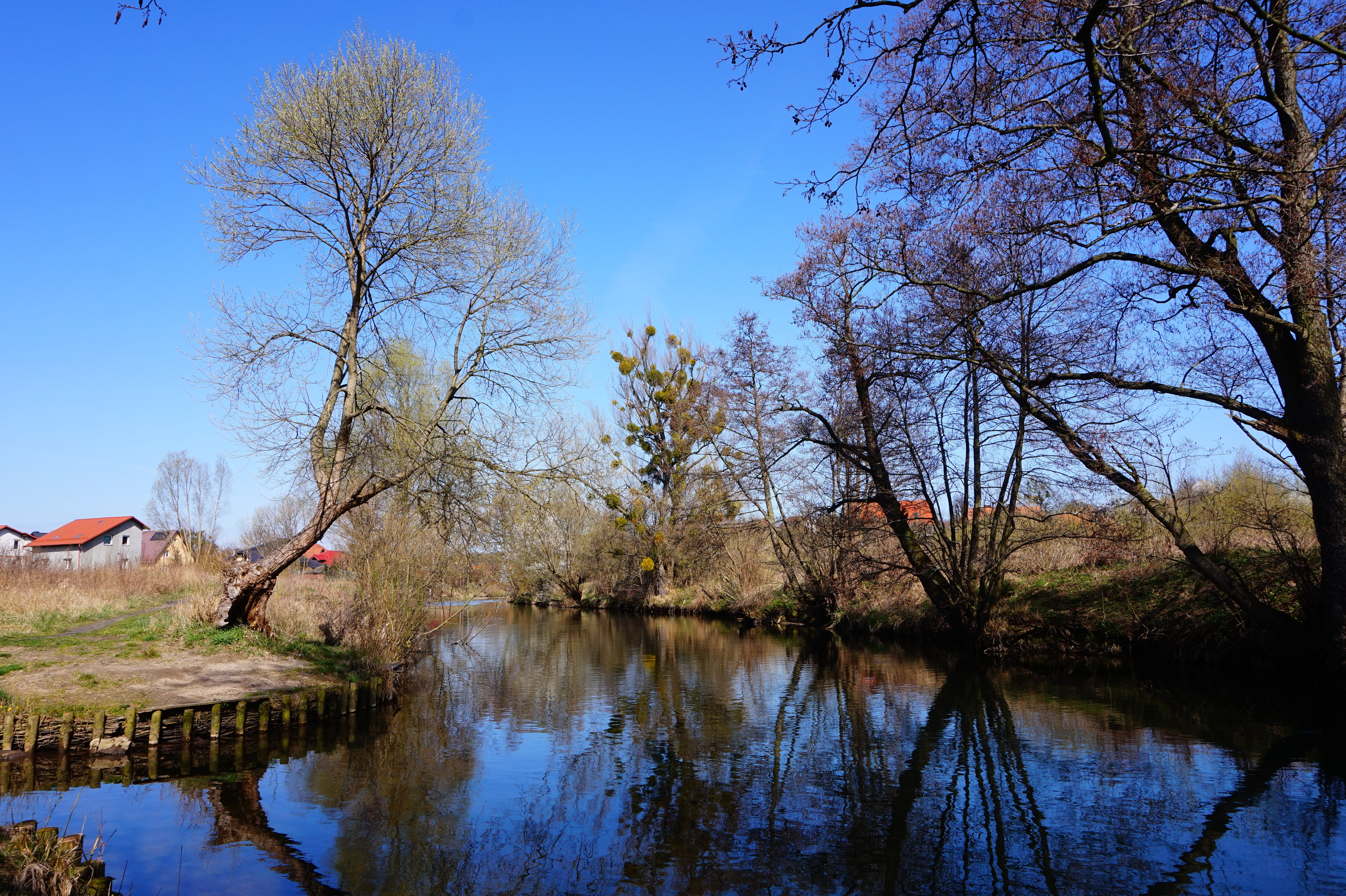 Rzeka Radunia, wieś Juszkowo